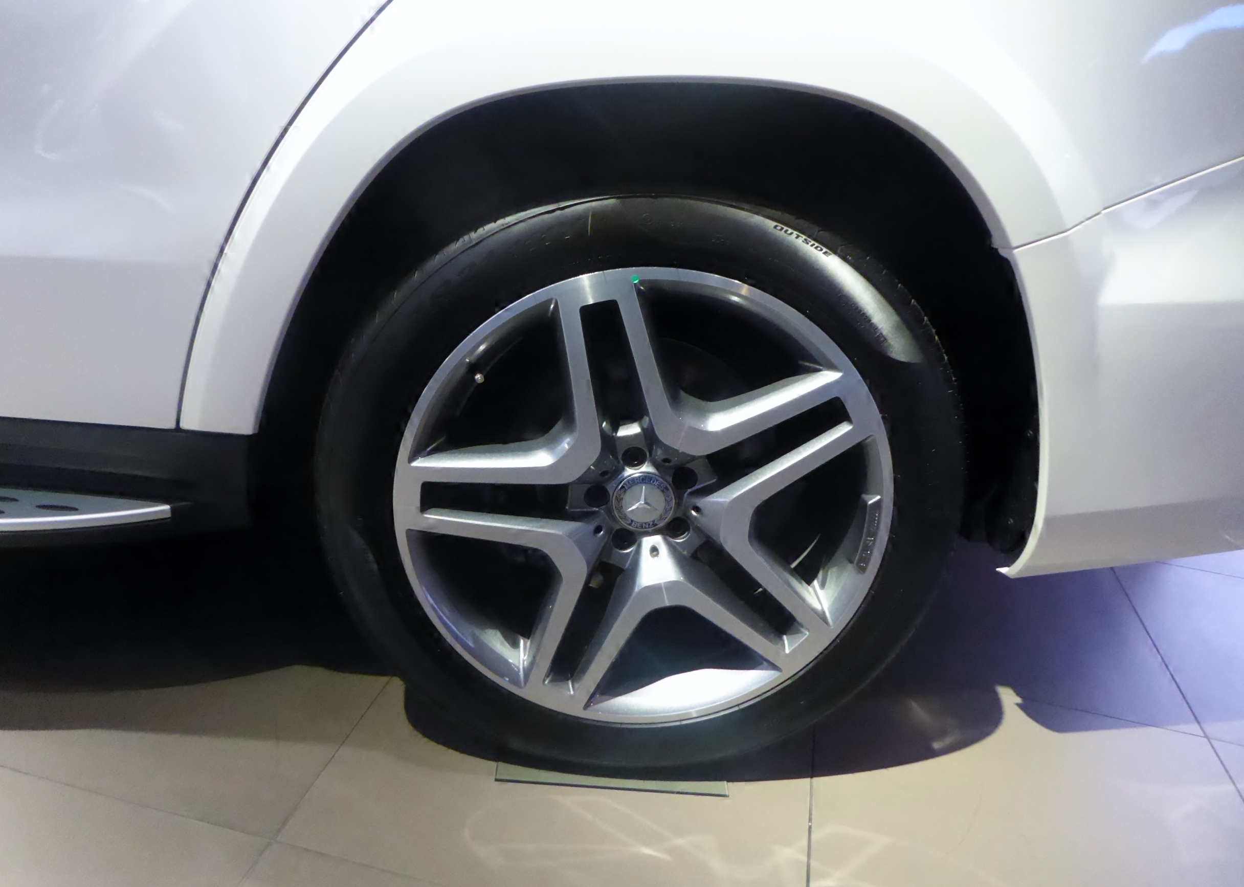 X166型メルセデス・ベンツ・GLS350d 4MATICスポーツのホイールを撮影。